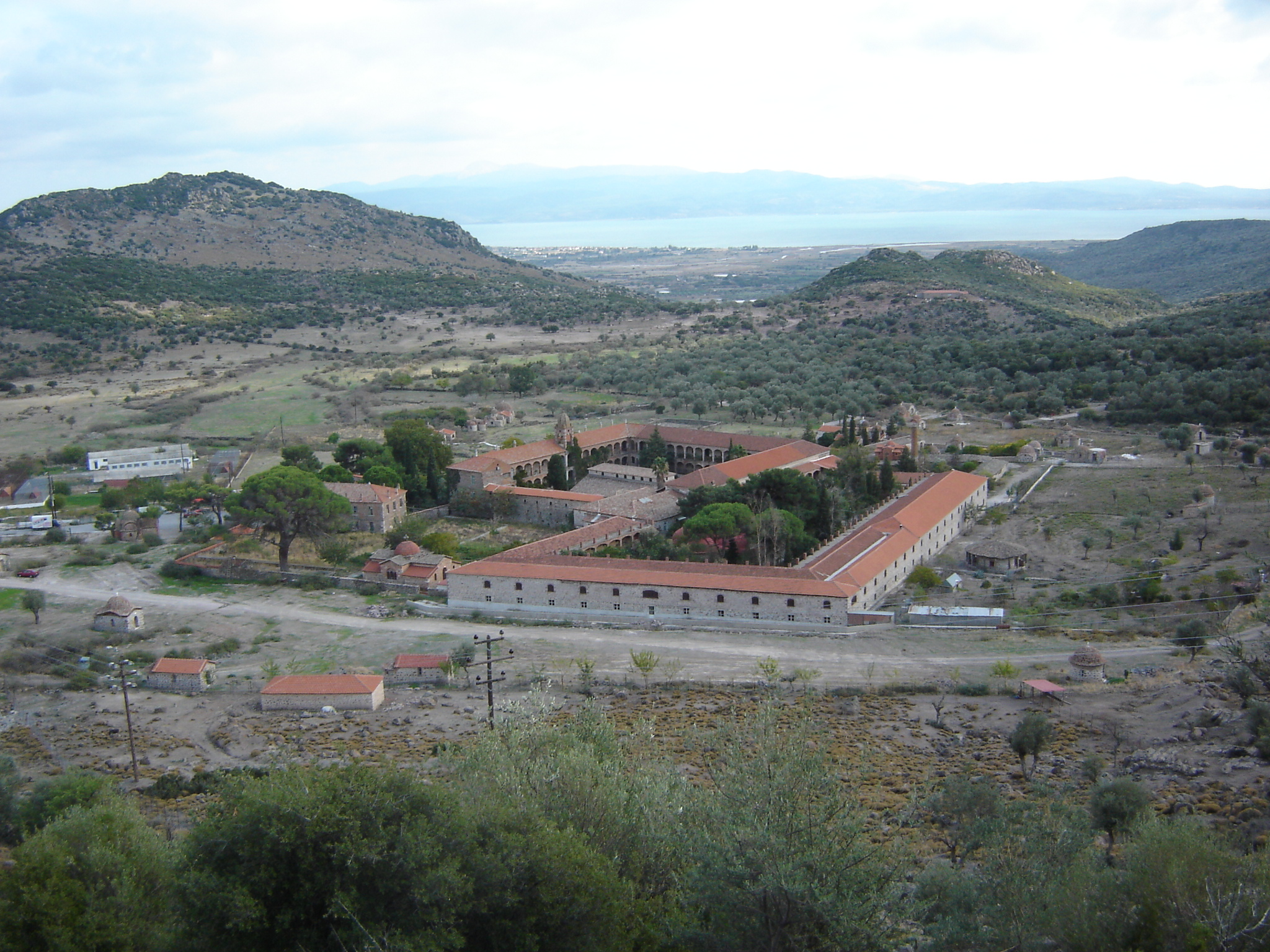 Monastery Limonos, Lesbos, Greece